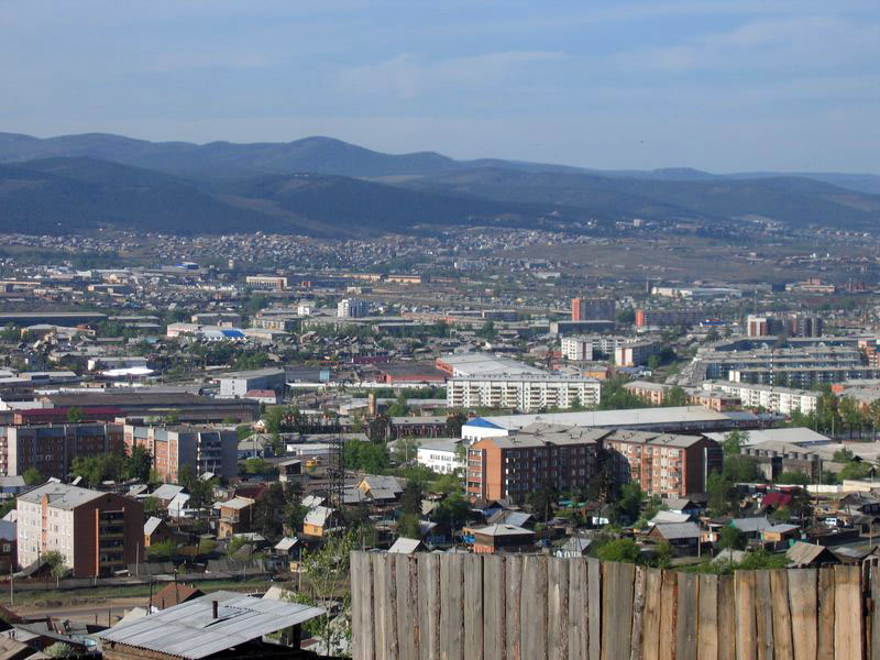 Вид на Улан-Удэ с горы на Новой Комушки